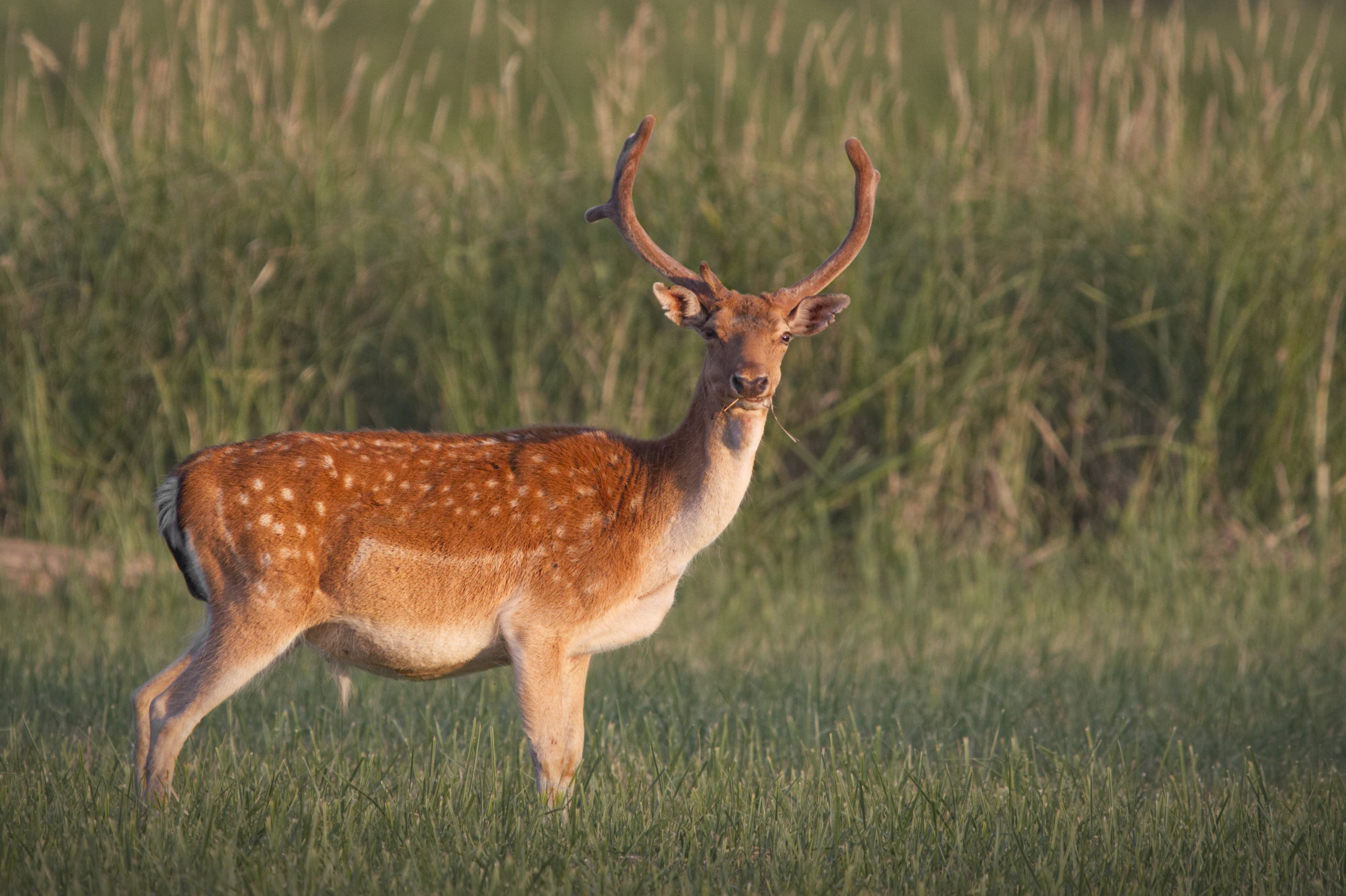 Ein junger Damhirsch abseits der großen Herde